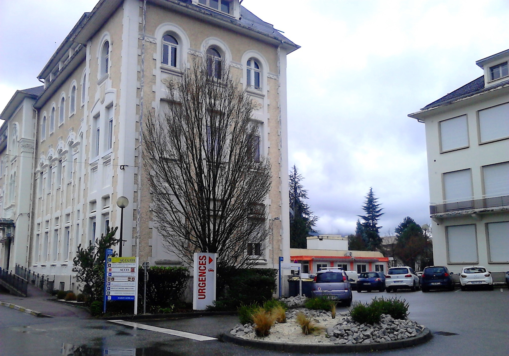 Vue du bâtiment principal des urgences du centre hospitalier général d'Aix-les-Bains en février 2016.